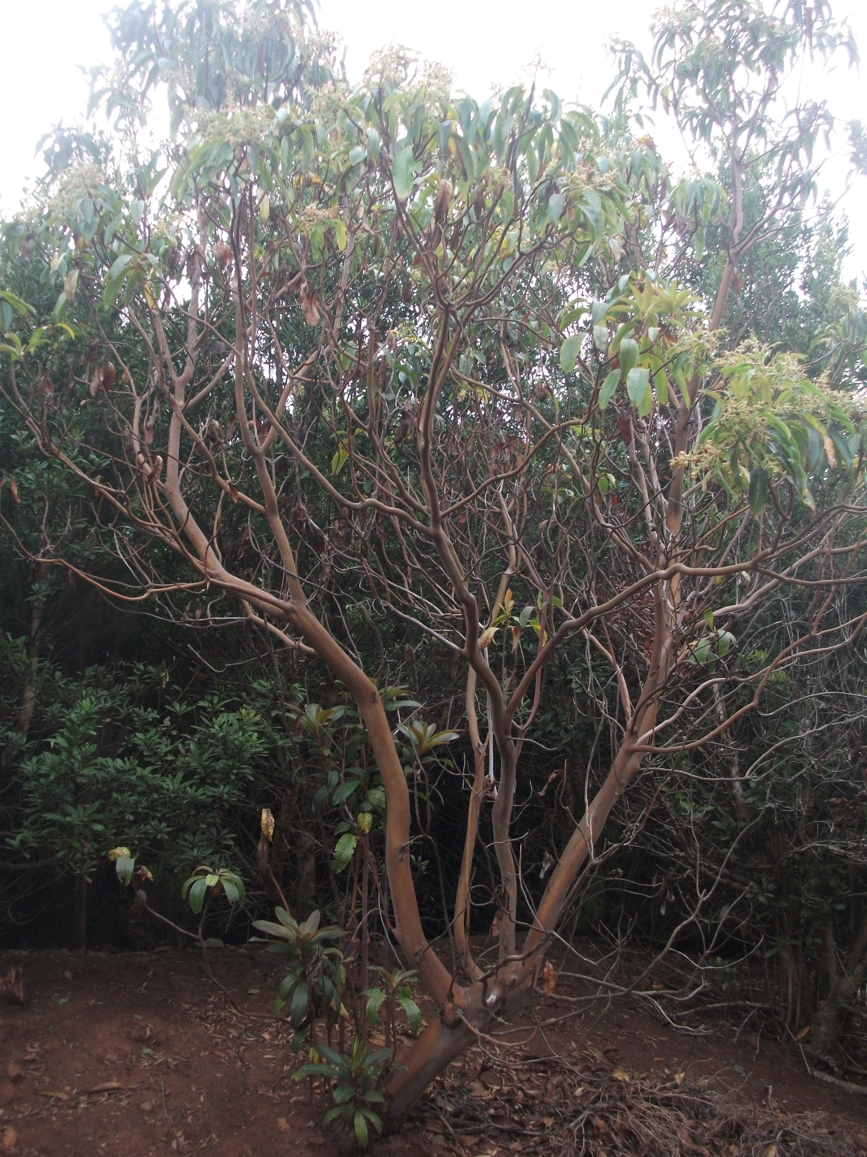 Foto tomada en el Macizo de Anaga (Tenerife), en el municipio de Tegueste.